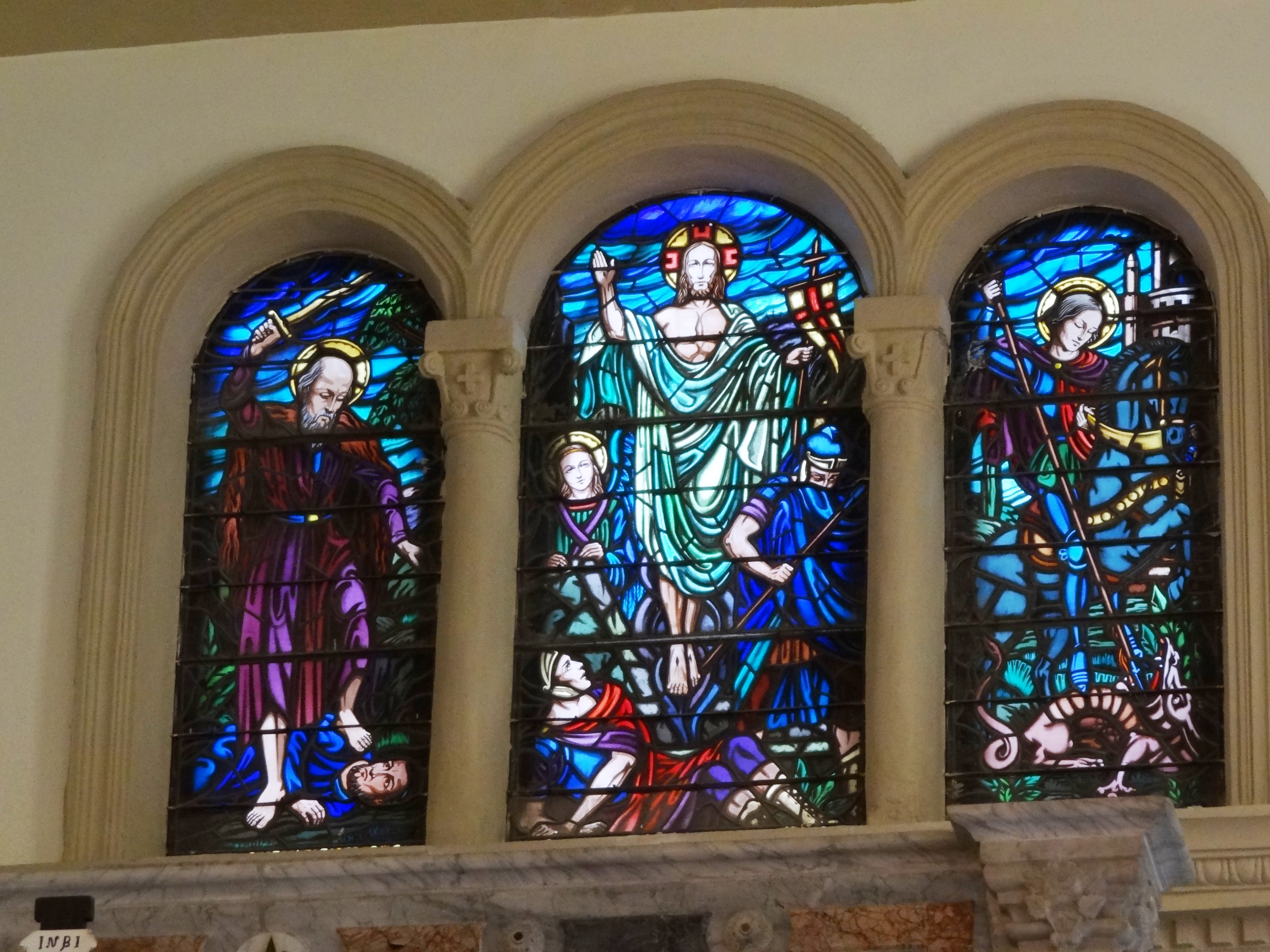 St. Elias Cathedral of the Melkite Catholic Haifa Israel קתדרלת אליהו הנביא של הכנסייה המלכיתית היוונית-קתולית בחיפה